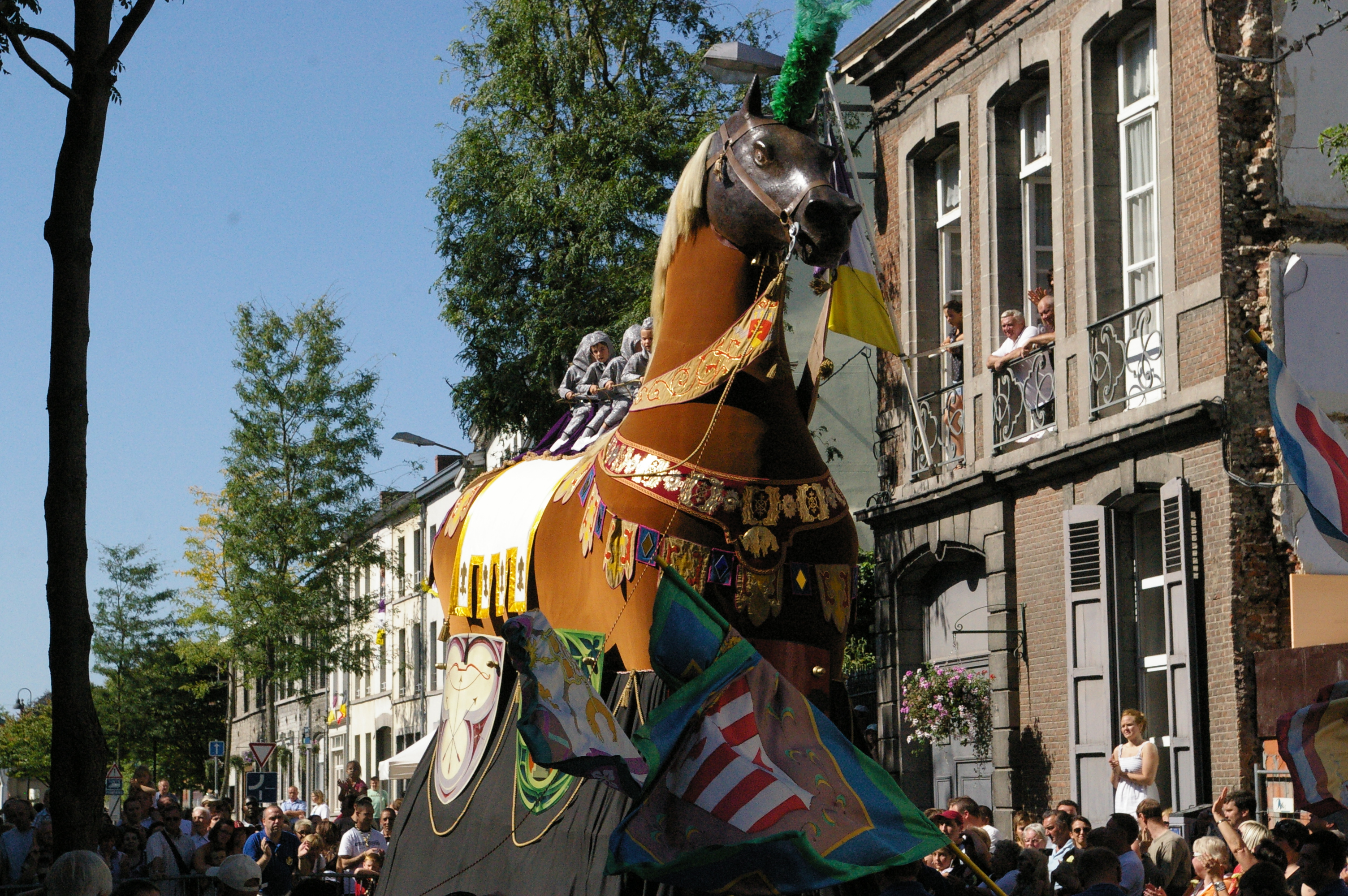 Le Cheval Bayard dans le cortège de la Ducasse d'Ath, 2009